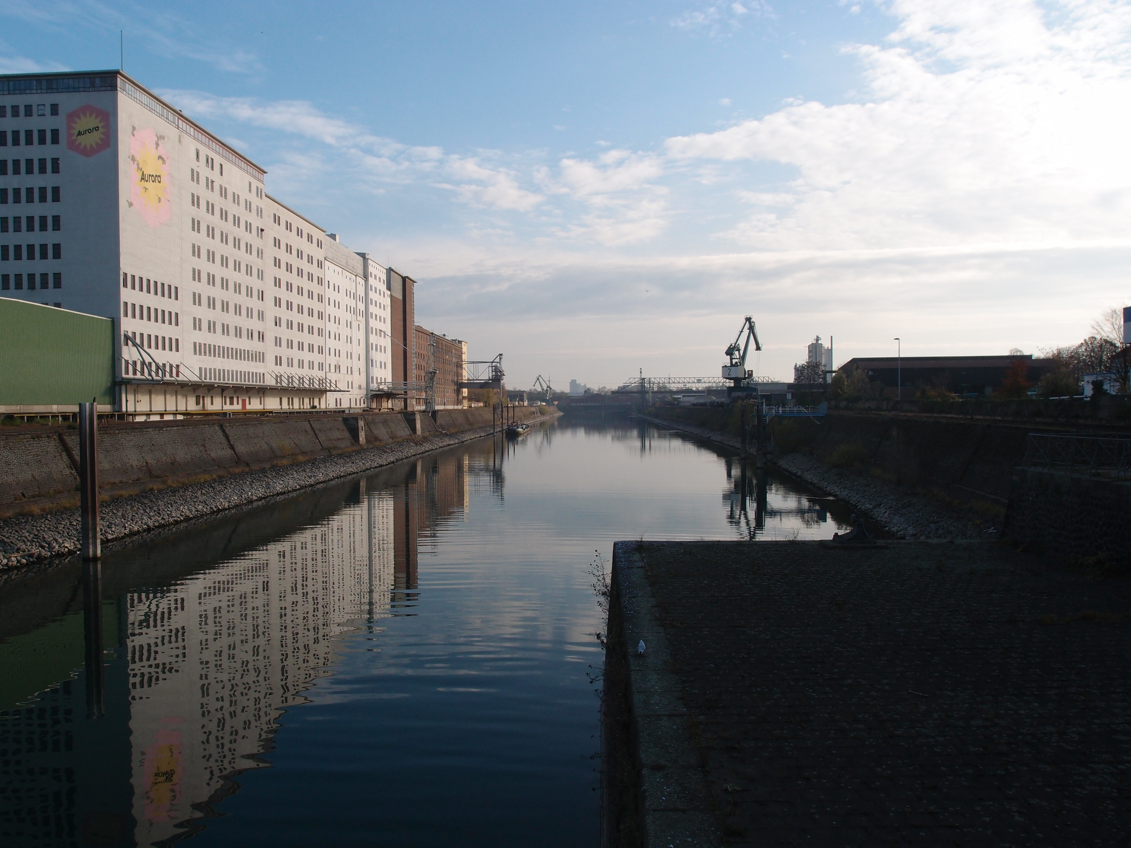 Teilansicht des Deutzer Hafens in Köln-Deutz Datum: 20.11.2011 Urheber: M. Pfeiffer alias Gordito1869 Quelle: Privates Fotoarchiv des Urheber